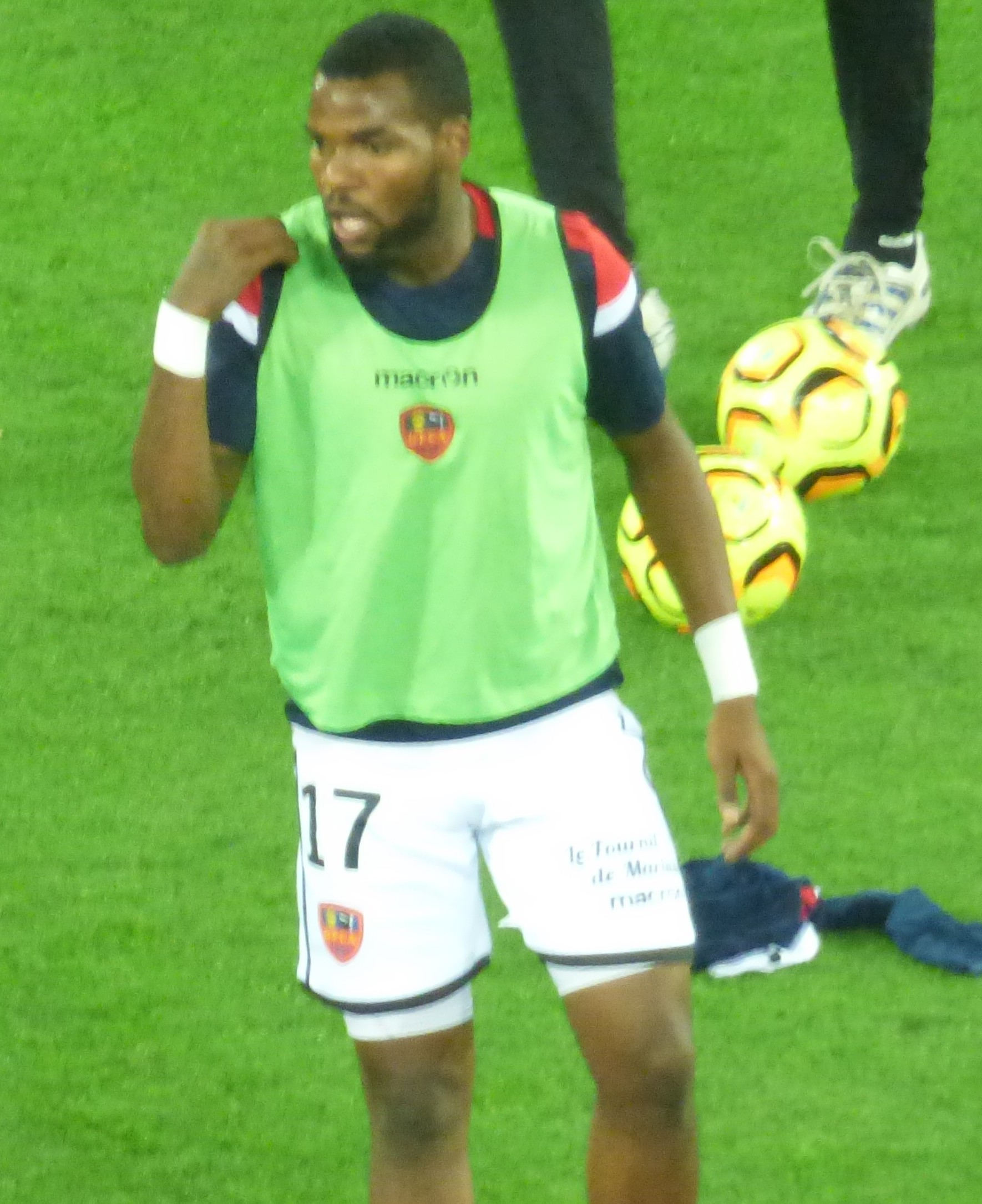 Aaron Boupendza avant le match RC Lens / GFC Ajaccio, comptant pour la onzième journée du championnat de France de Ligue 2 2018-2019 au Stade Bollaert-Delelis, le 22 octobre 2018.